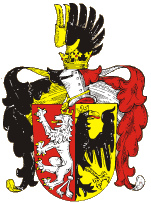 Znak města Mělník